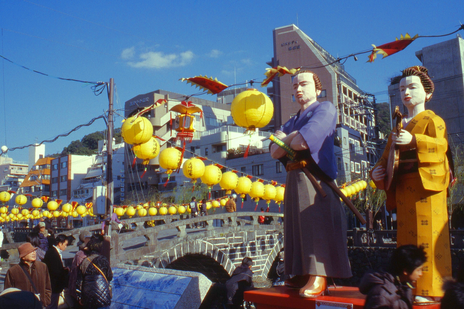 長崎市で行われる「長崎ランタンフェスティバル」の中島川公園会場の様子。2010年2月撮影。OLYMPUS OM30＋OM ZUIKO 28/3.5 RHPⅢ